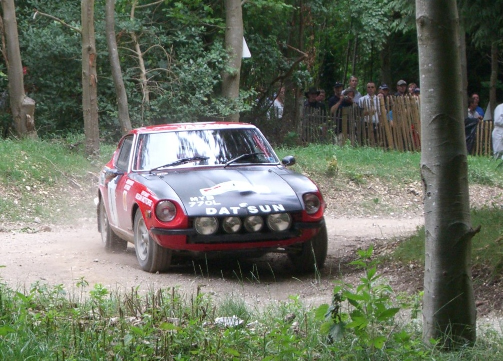 1972 Datsun 240Z at 2006 FOS.